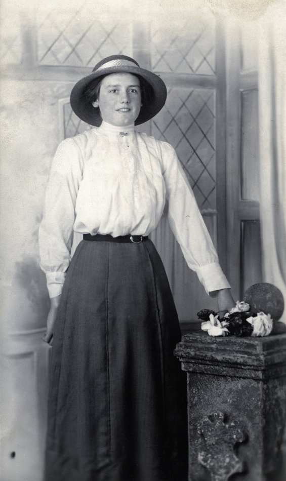 Portrait photographique d'Elsie Ward Hering (1872-1923), vers 1890. Carte postale, collection Louis et Gladys Ward. Photographe inconnu.